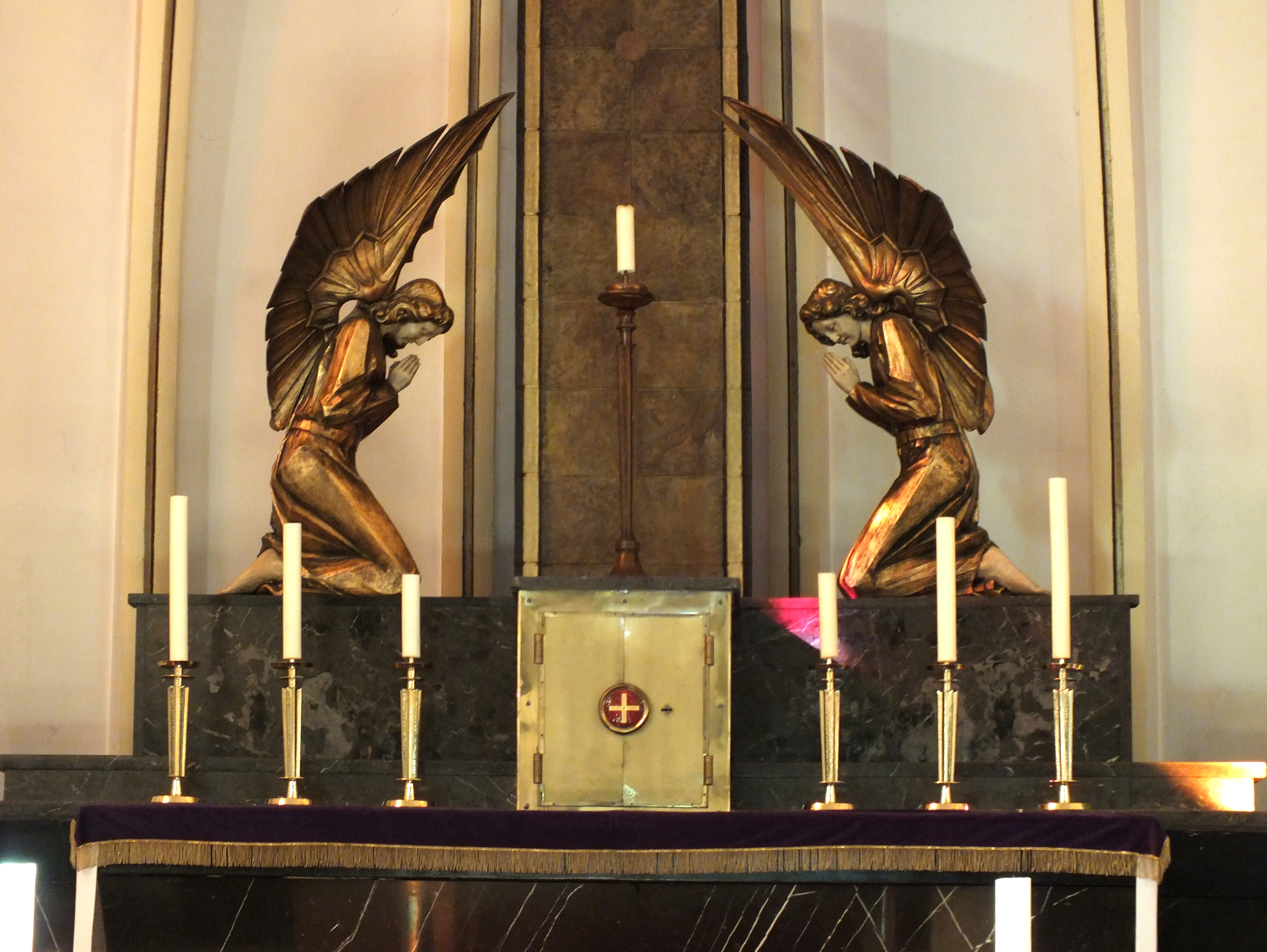 Kirche Maria Magdalena, Berlin-Niederschönhausen: Altardetail